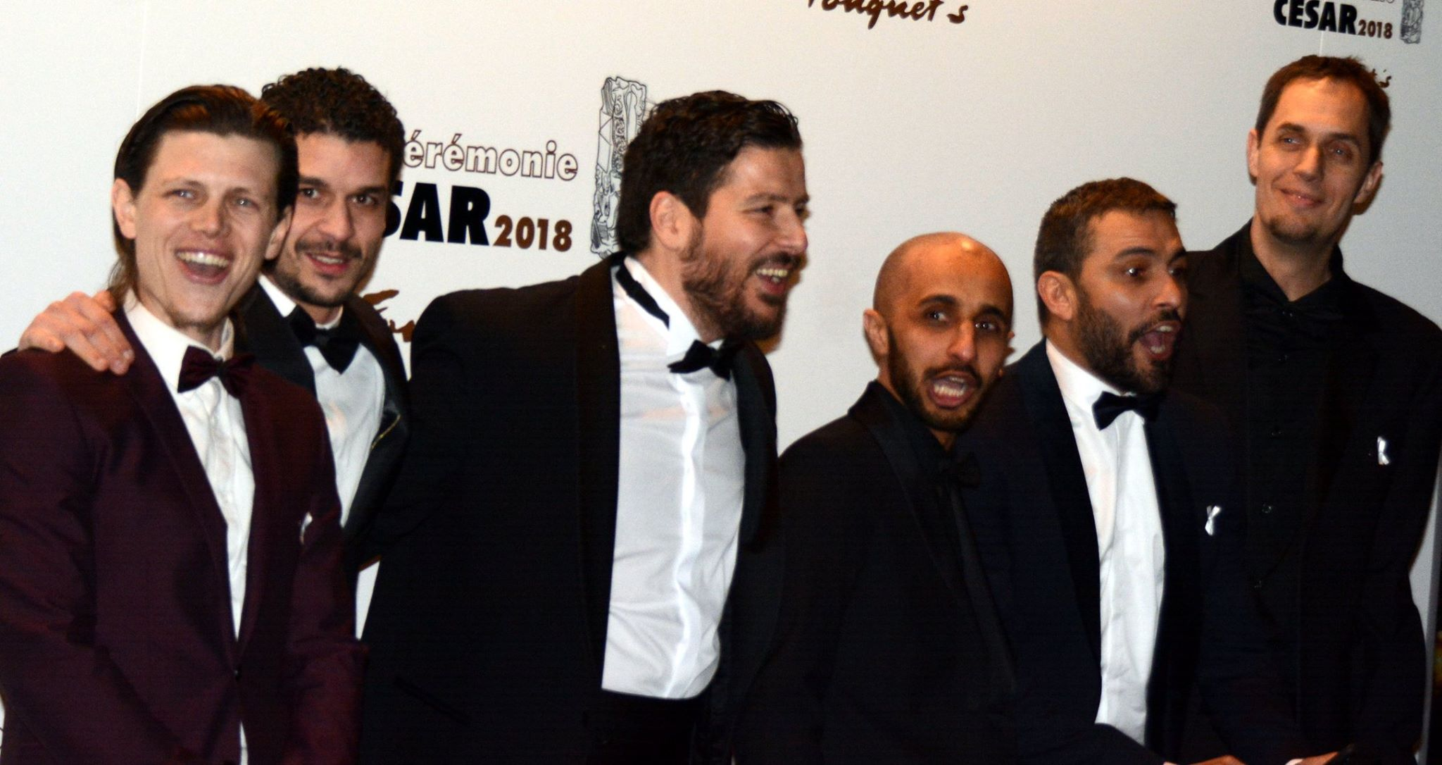 L'équipe du film "Patients" à la cérémonie des César